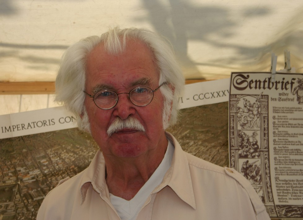 Der Autor Hans Hübner während einer Veranstaltung in Berlin-Friedrichshain.